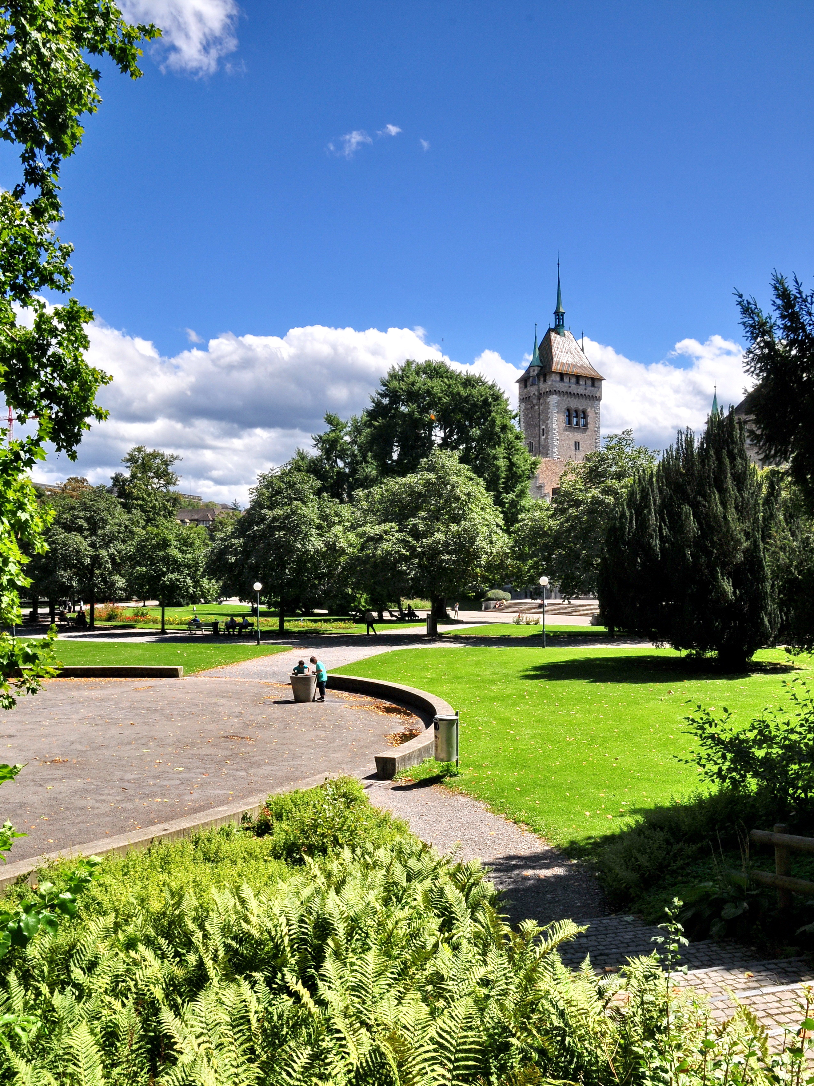 Platzspitzpark & Landesmuseum in Zürich (Switzerland)